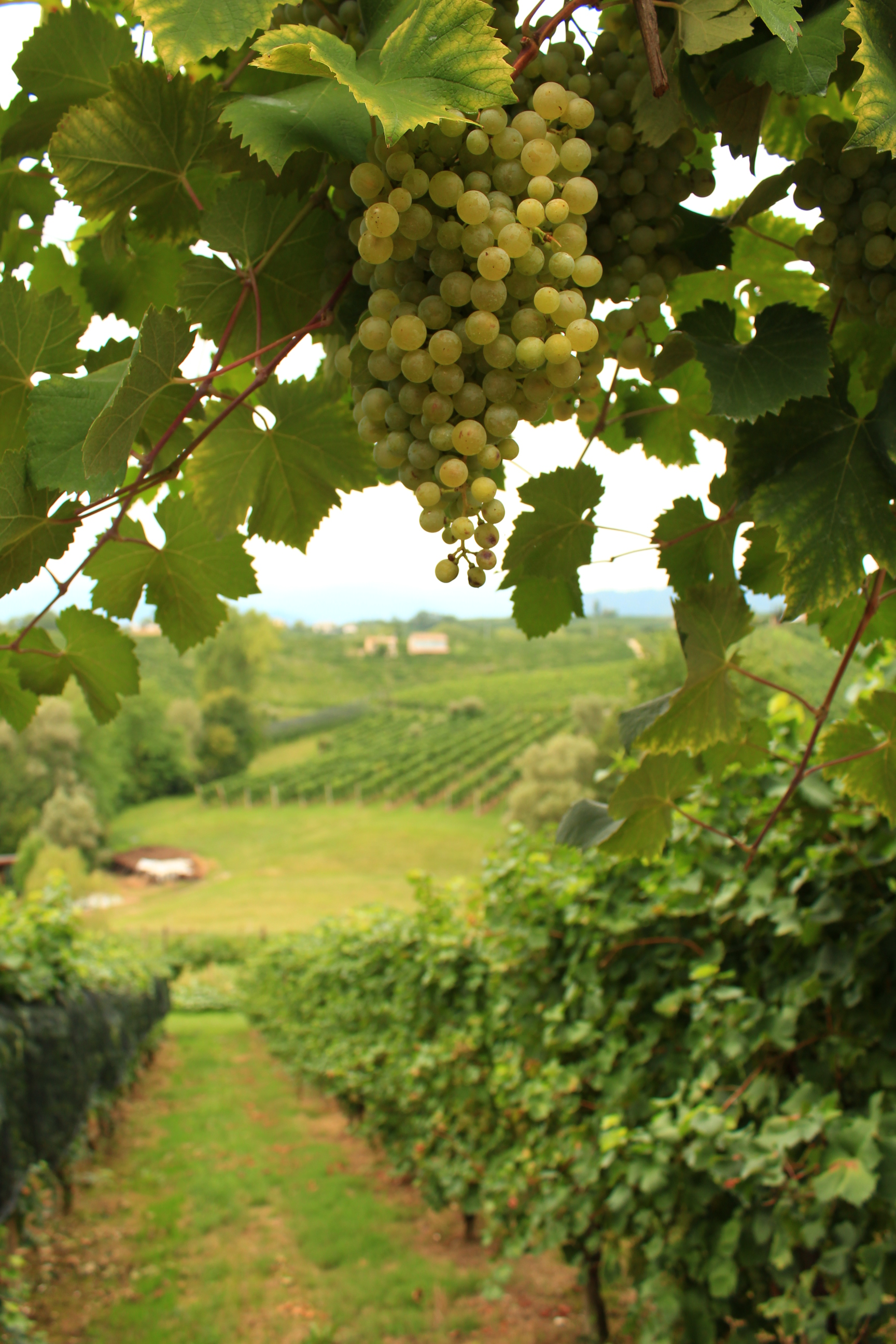 Prosecco